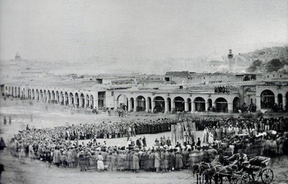 Old Bazaar in Yerevan - Ghantar Երևանի հին շուկան՝ Ղանթար